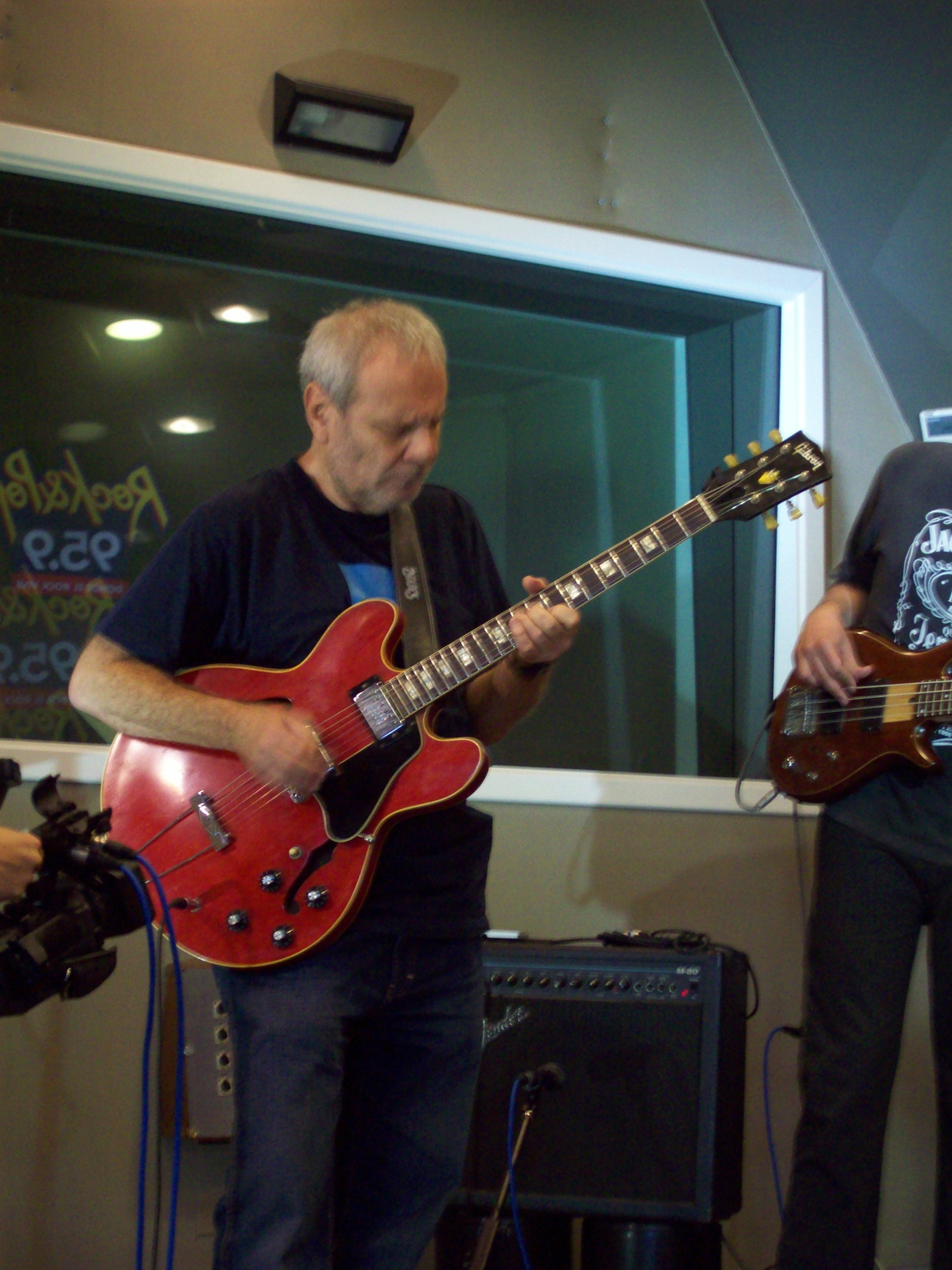 Claudio Gabis, Frans Banfield, Gustavo Giannini ensayando en la sala Norberto Napolitano en la Rock & Pop.